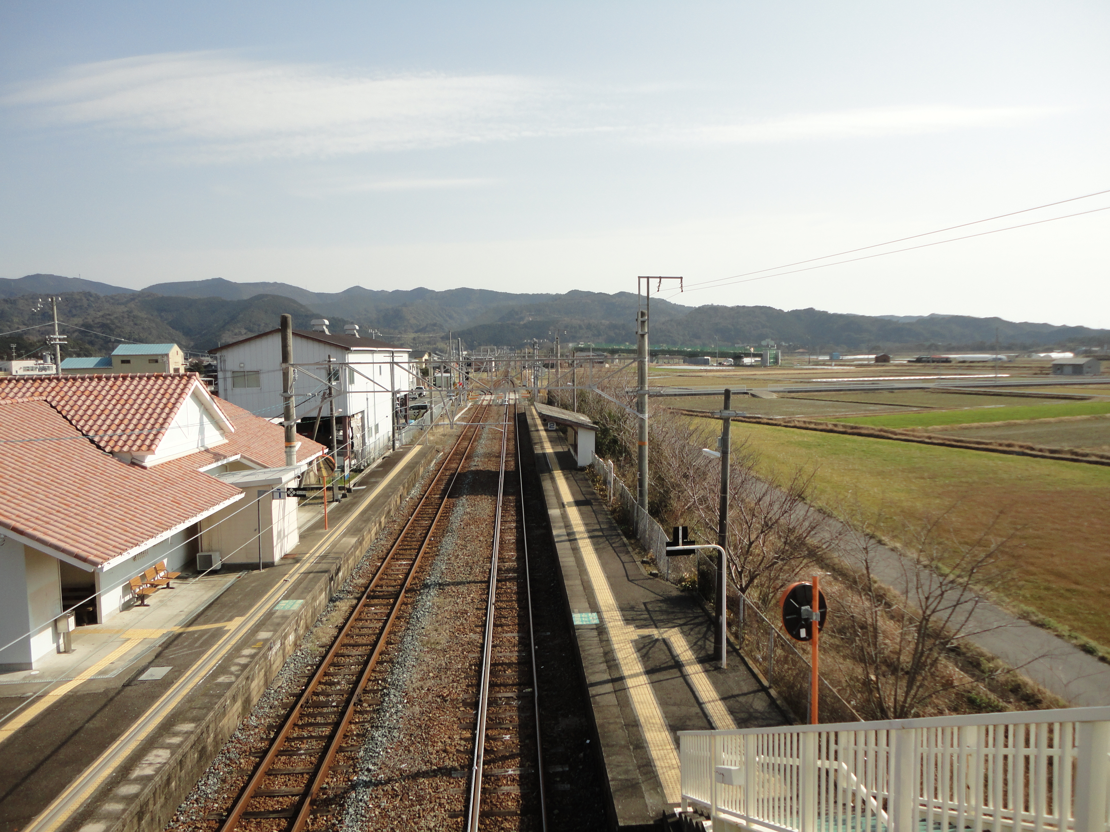 紀伊富田駅 跨線橋より新宮方を望む